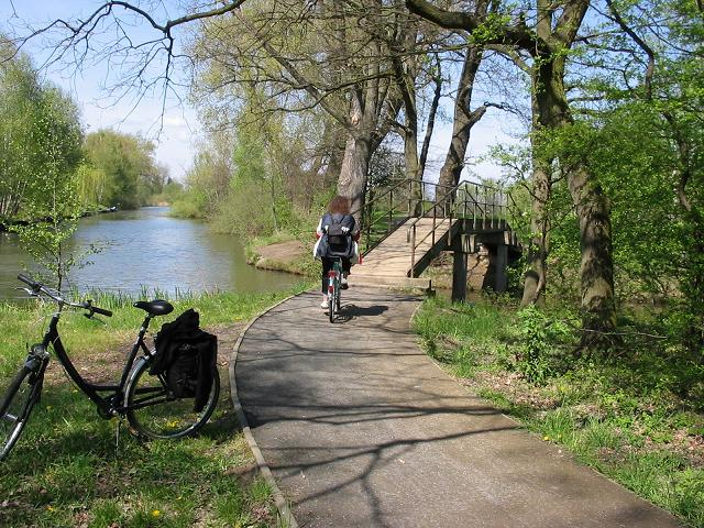 Gurken_Radweg_2 Selbst fotografiert, April 2004 GNU FDL